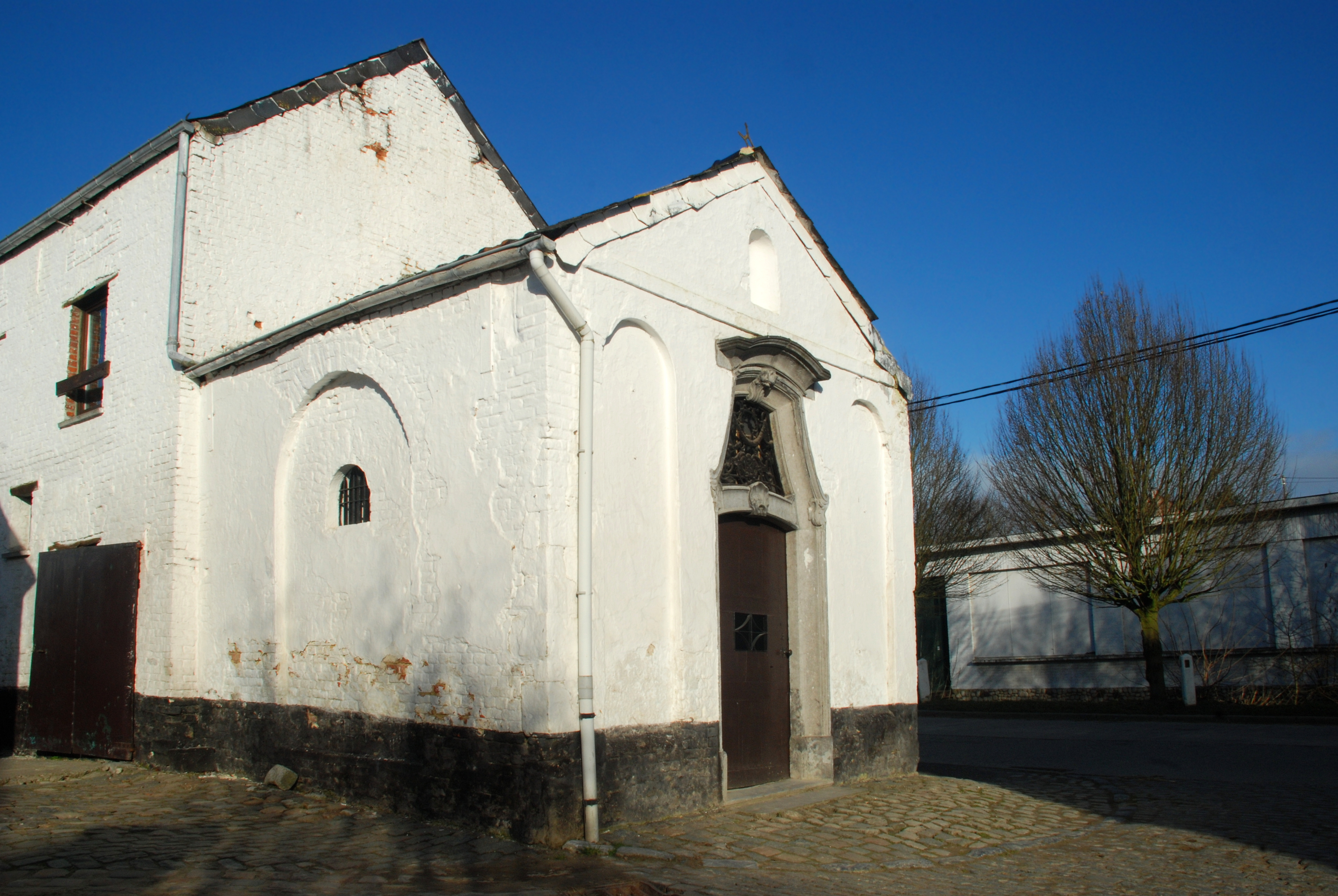 Belgique - Brabant wallon - Chapelle Notre-Dame des Affligés de Ways